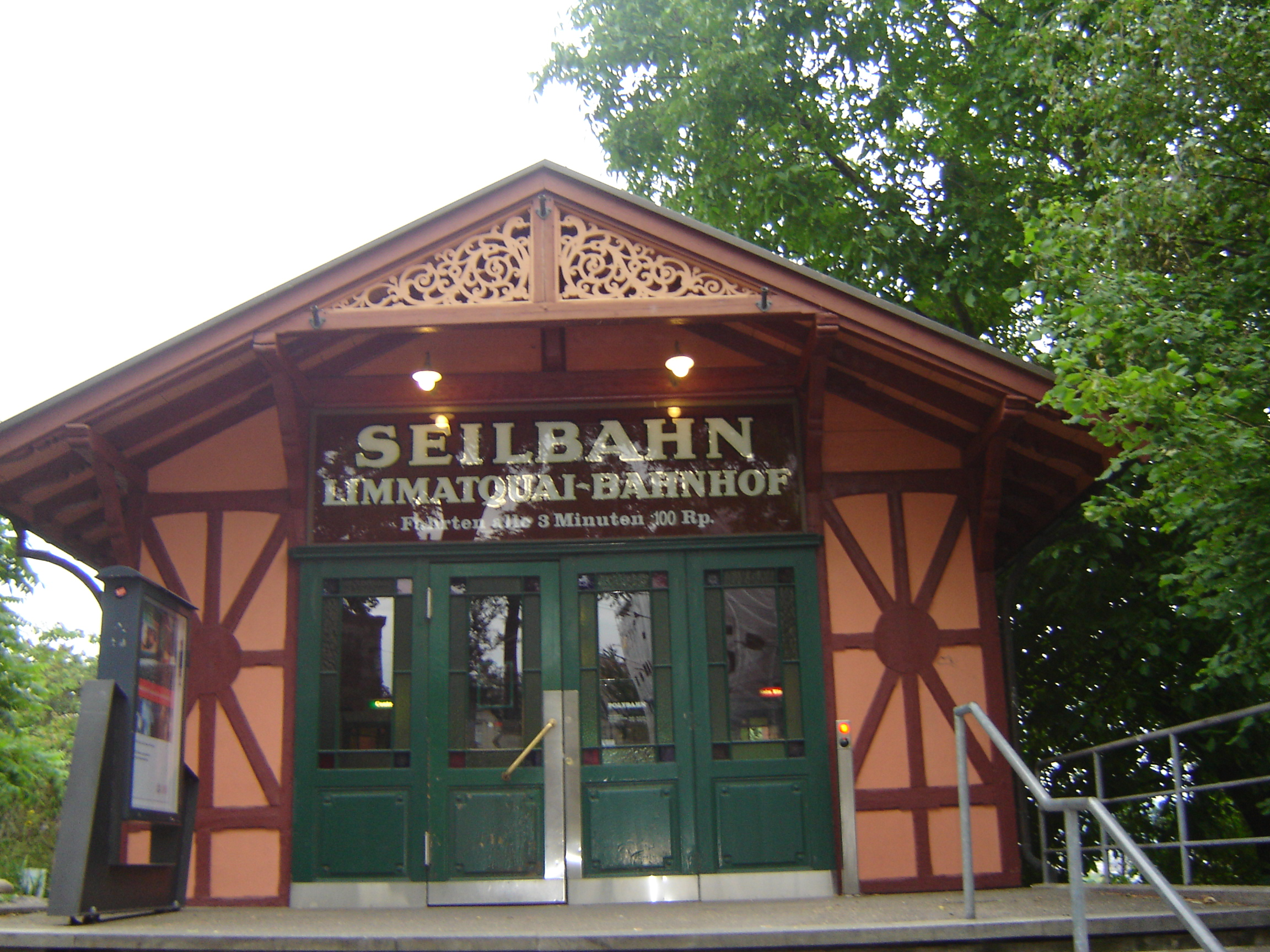 Bergstation der Polybahn